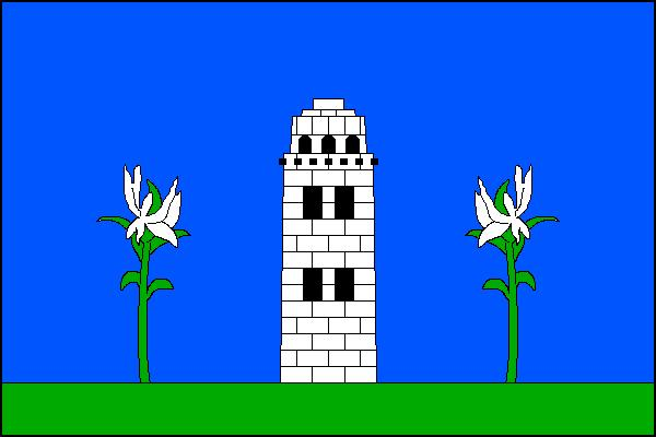 Vlajka obce Úvalno